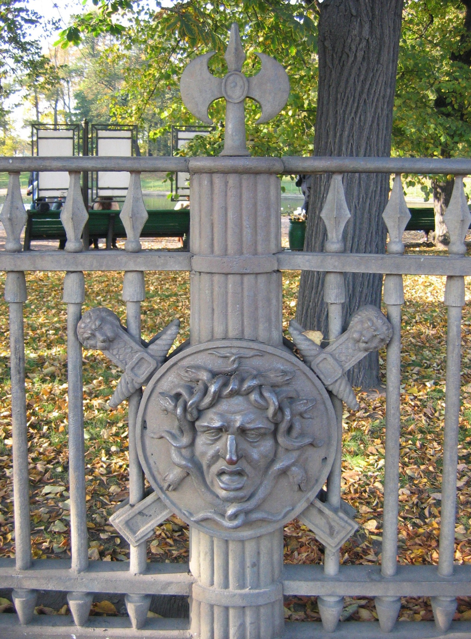 Фасция на решетке Летнего сада, со стороны реки Фонтанки